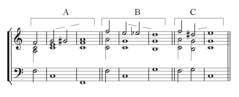 Description : Mouvement chromatique Source : Personnelle Licence : GFDL